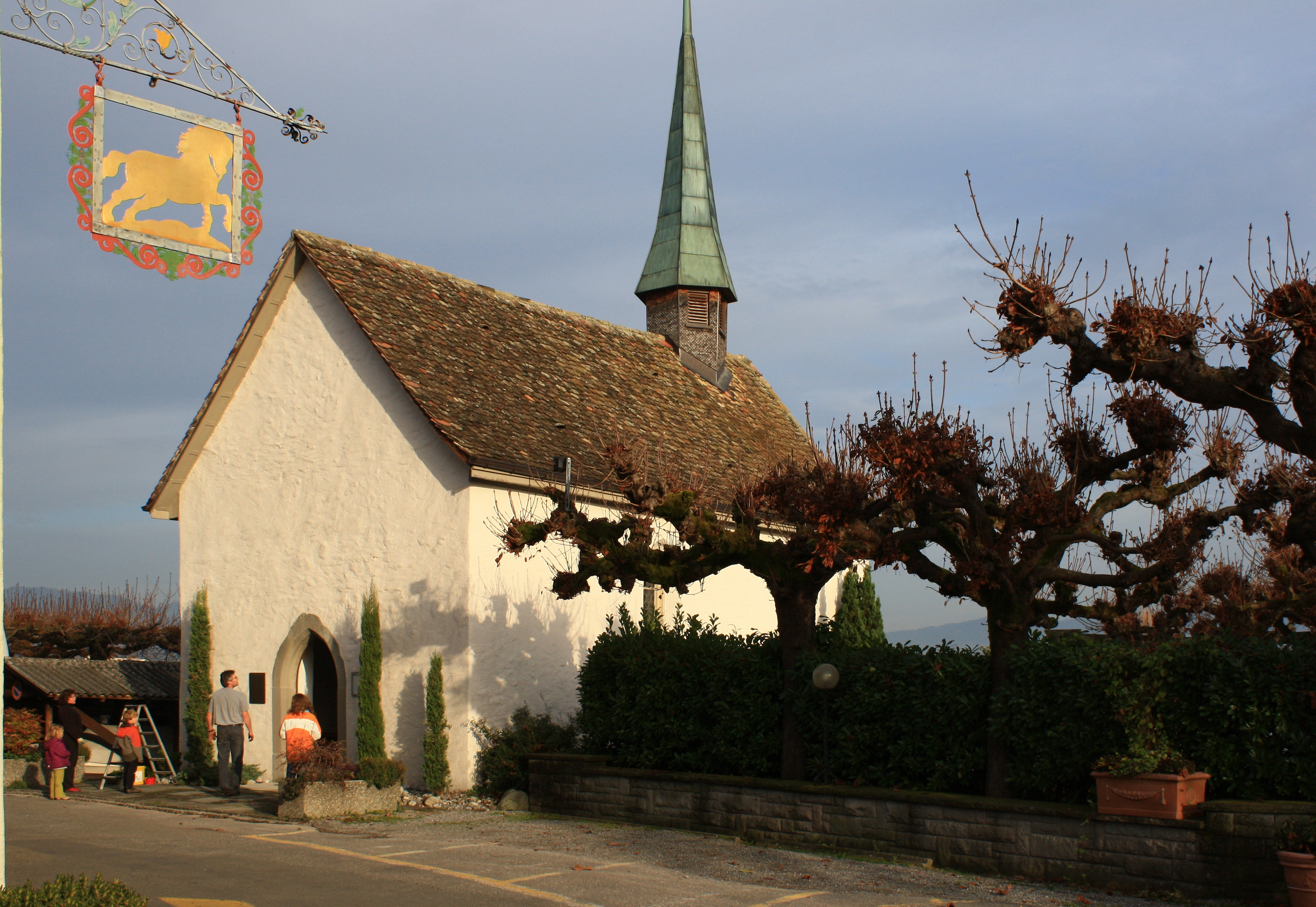 Kapelle zu Ehren der heiligsten Dreieinigkeit (Holy Trinity chapel) in Hurden (Switzerland) on Obersee (upper Lake Zürich) shore